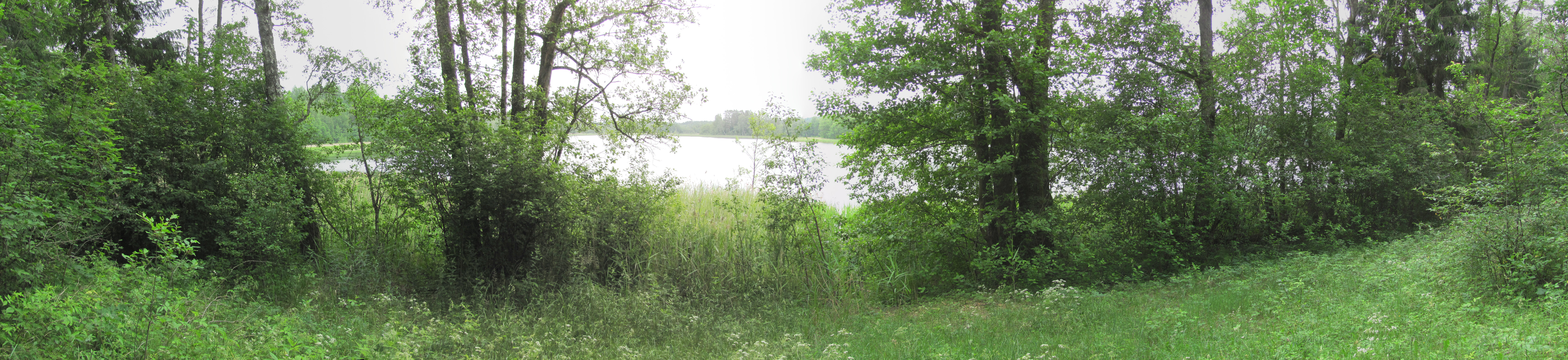 Dusetų sen., Lithuania